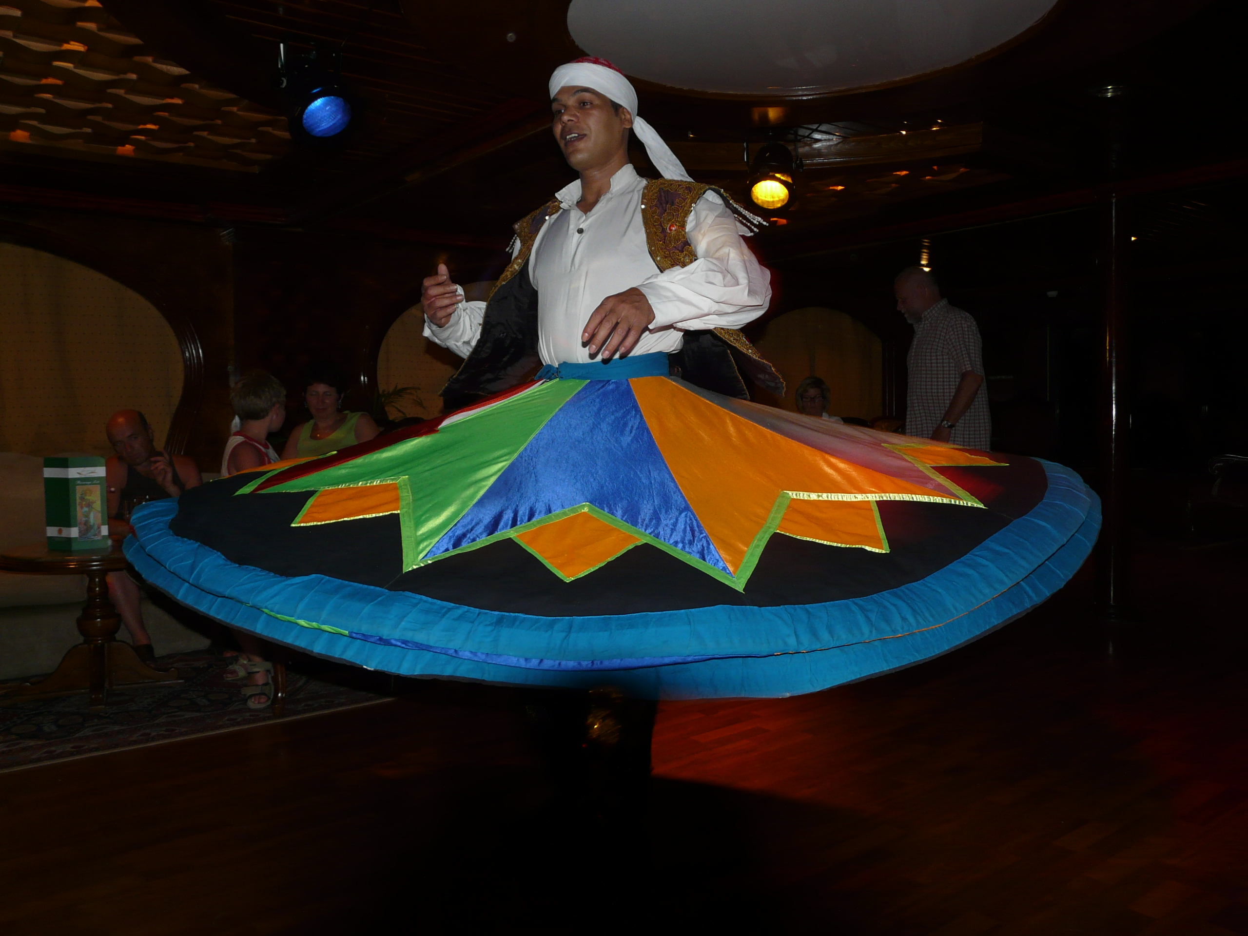 Egypt - Nile cruise